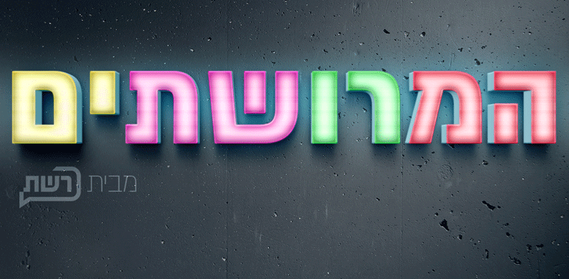 המרושתים